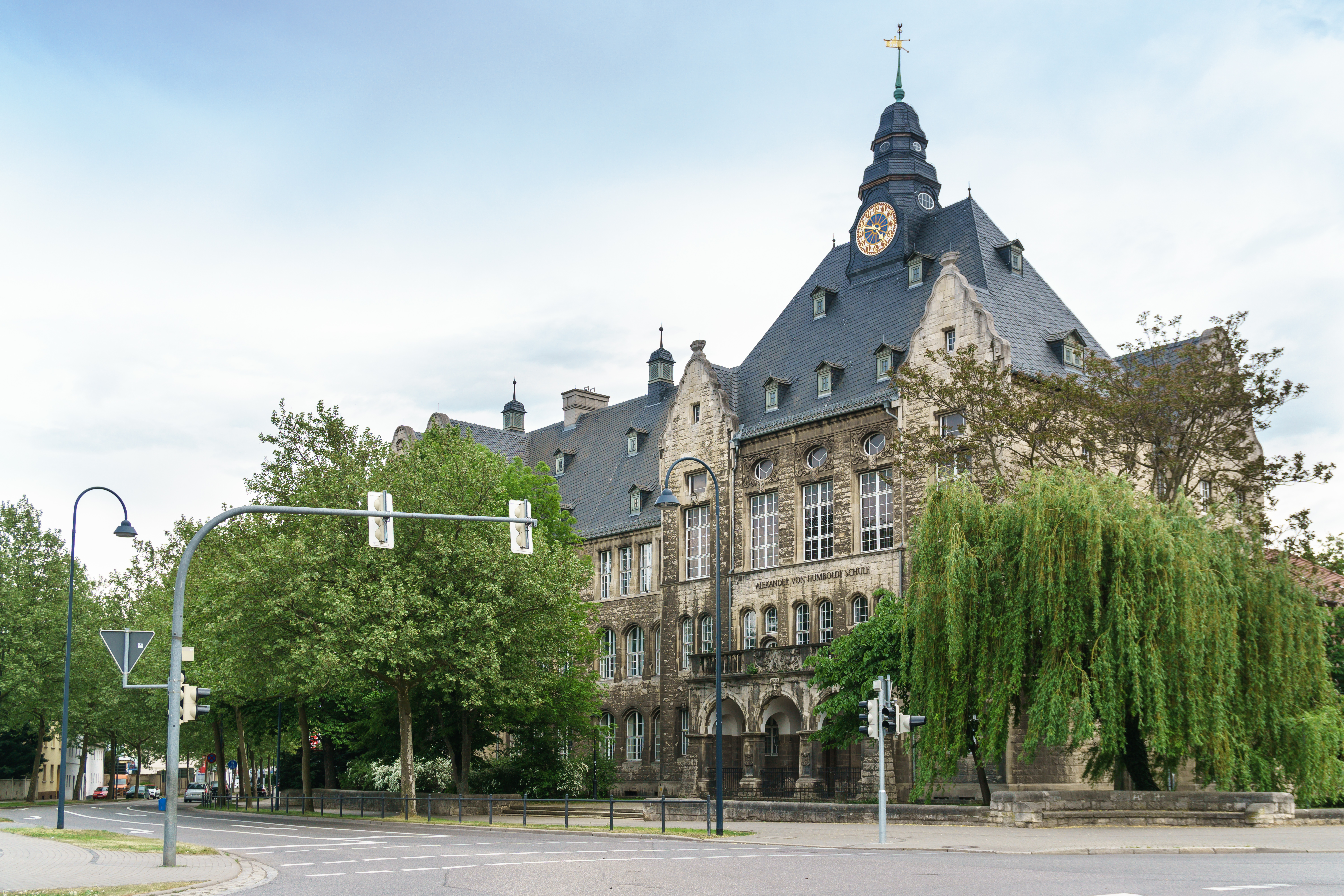 Alexander-von-Humboldt-Schule, Curt-Becker-Platz 3 in Naumburg